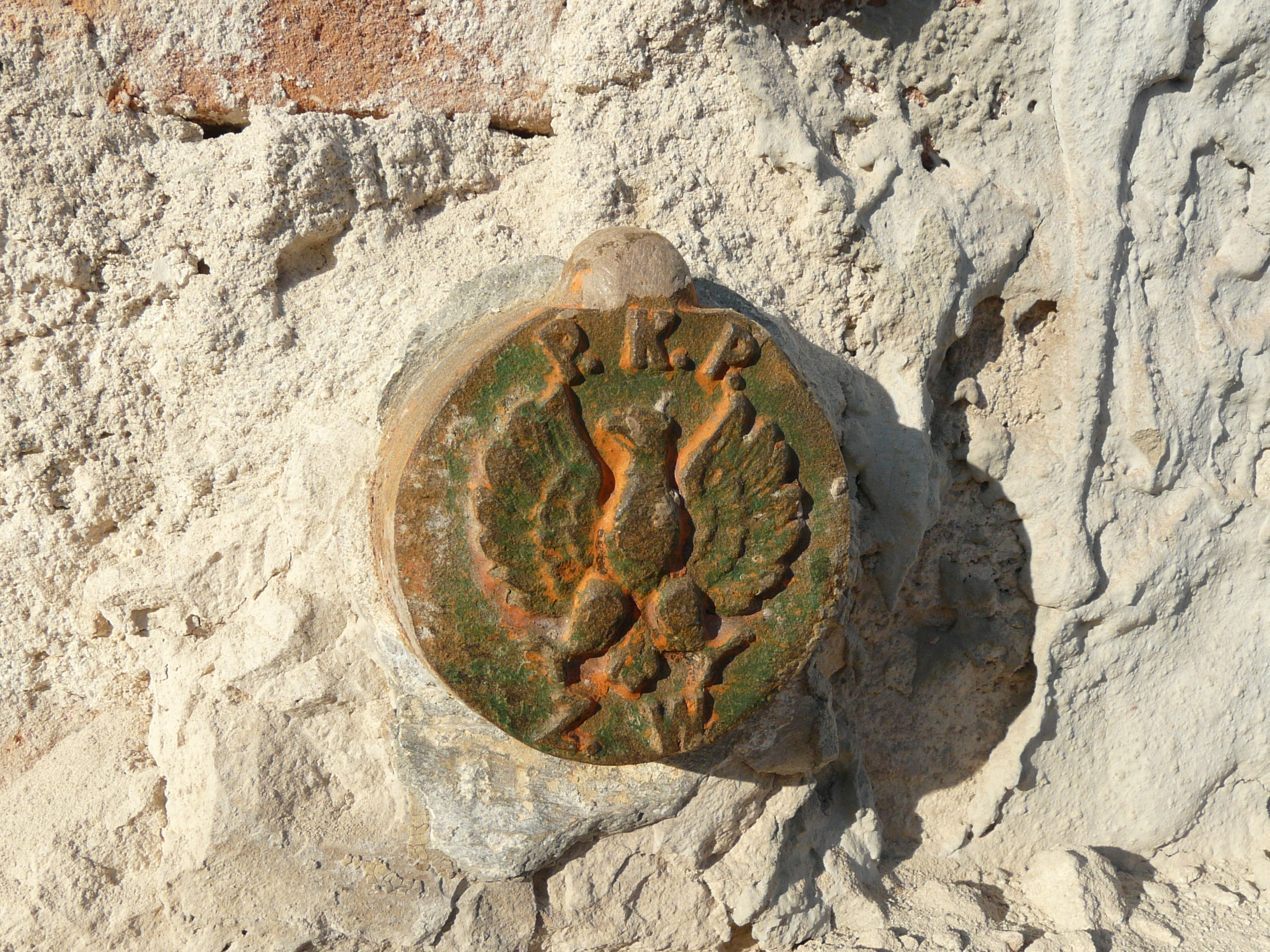 Znak geodezyjny tzw. reper, umieszczony w ścianie budynku kolejowego na stacji kolejowej w Stróżach